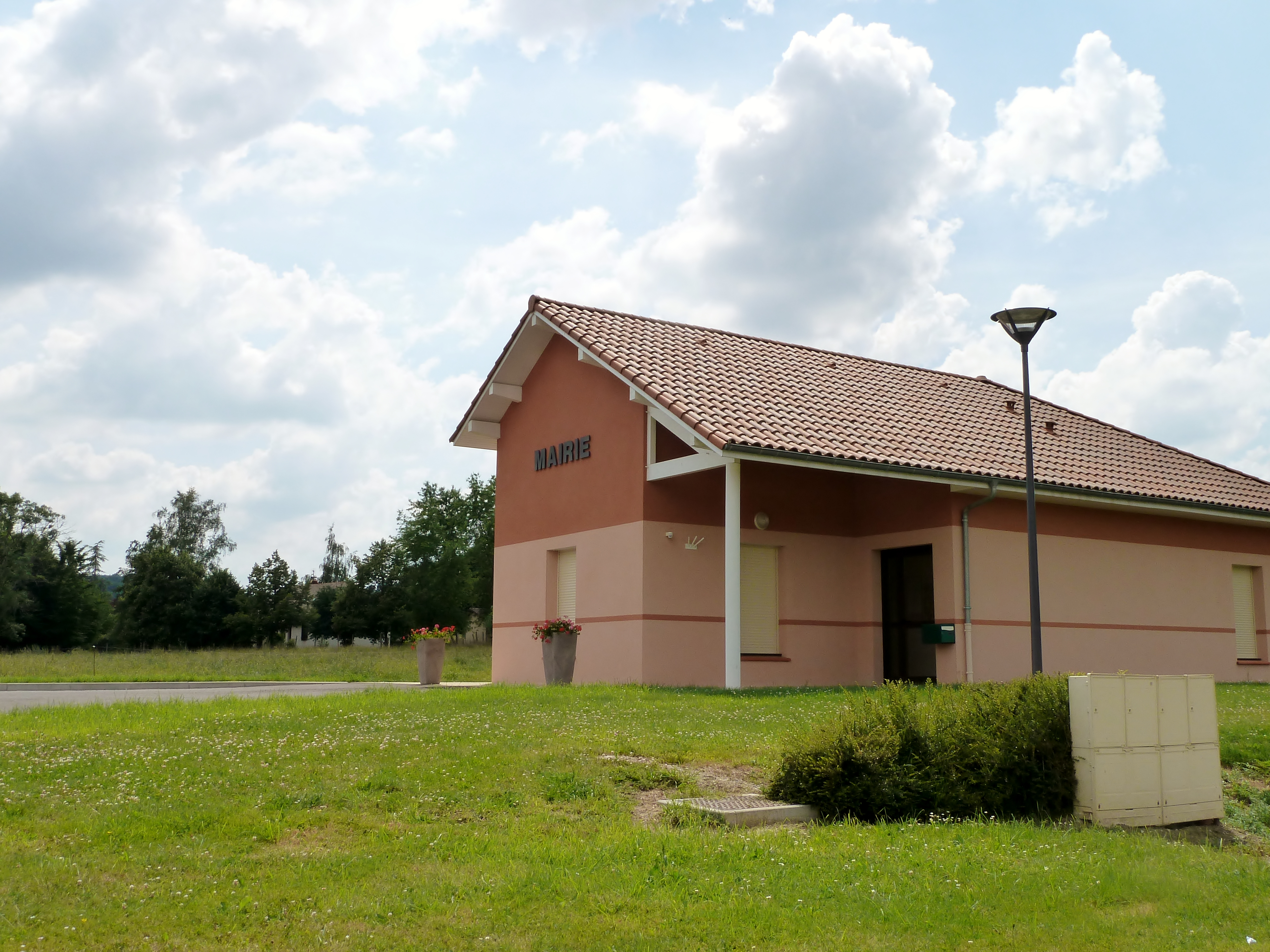 Mairie de Peyrelongue-Abos